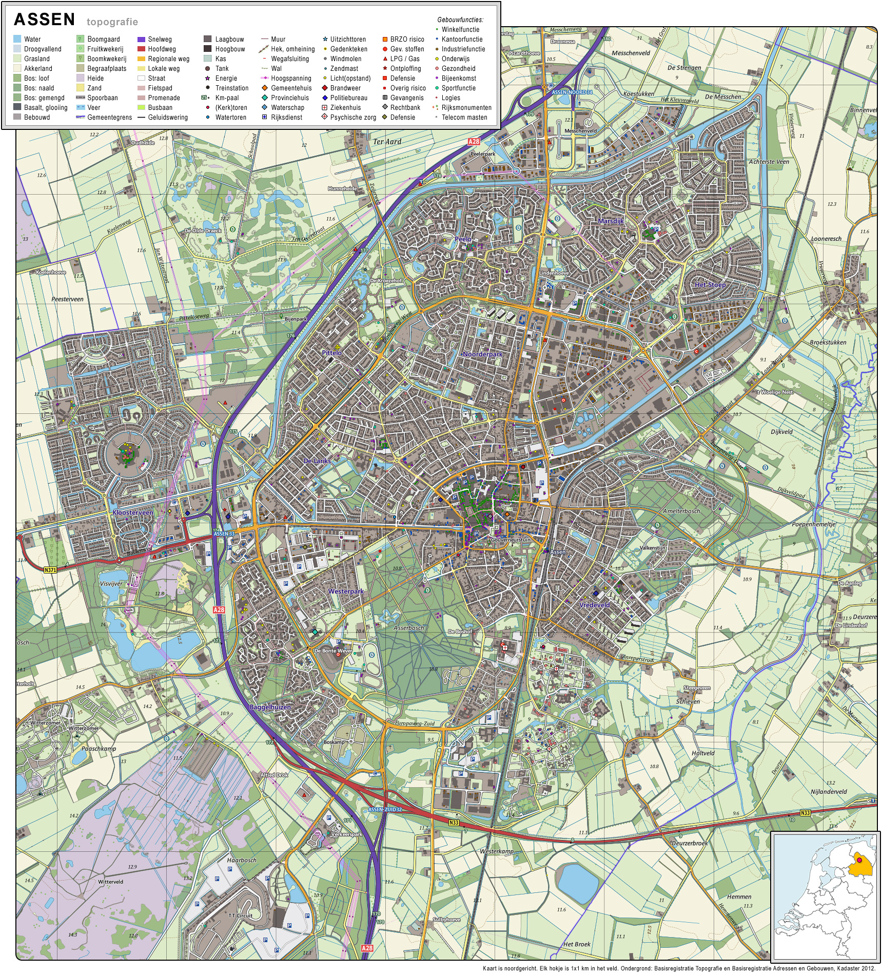 Topografisch beeld van de stad Assen. Op basis van de GML open geodata van de BRT/Top10NL (basisregistratie Topografie, Kadaster 2012), vrijgegeven door Kadaster op 30-11-2012 onder de Creative Commons BY licentie. Gebouwvlakken vanuit Open Geodata BAG extract (december 2012). Samenstelling en kleurenschema: Jan-Willem van Aalst.